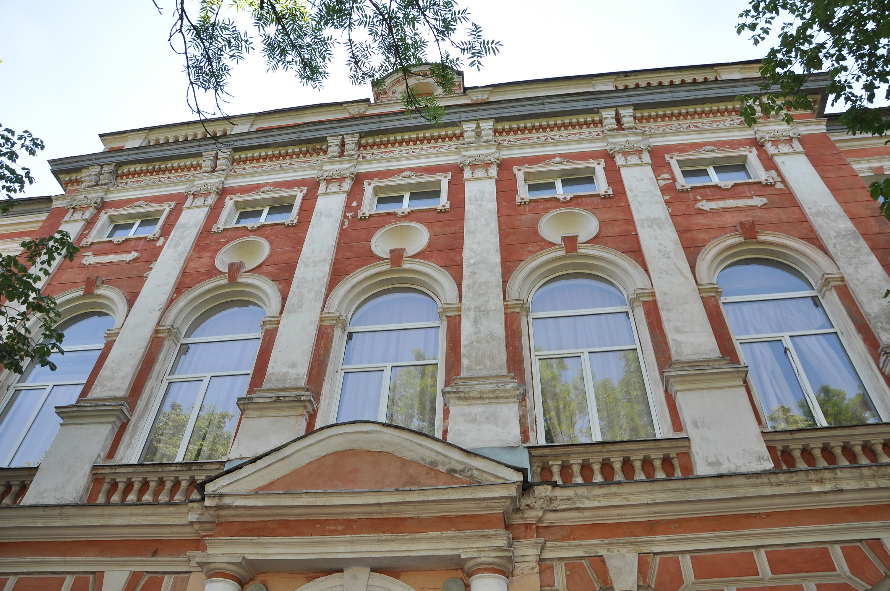 Фасад пам'ятки архітектури місцевого значення в Бучачі на вул. Шкільній, 4: будинок колишньої гімназії, в якій навчався український етнограф, фольклорист, мовознавець, літературознавець, мистецтвознавець, перекладач та громадський діяч Володимир Гнатюк.